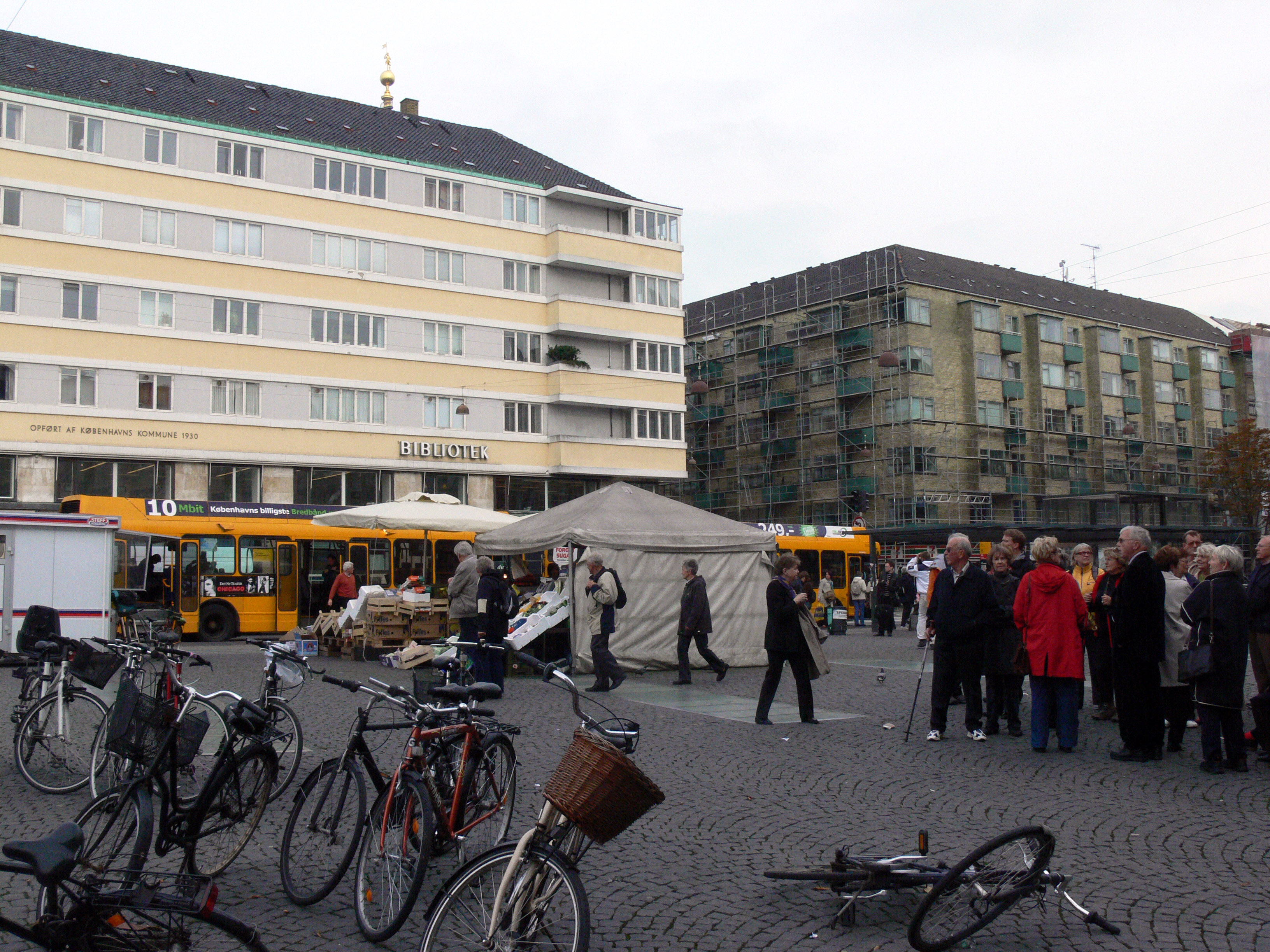 Christianhavns torv. An der Stelle der beiden modernen Gebäude befand sich früher eine Wollfabrik, die an ein Zuchthaus angeschlossen war. Die männlichen Verbrecher mussten Farbe reiben, was sehr gesundheitsschädlich war, die Frauen waren im Spinnhaus eingesetzt.